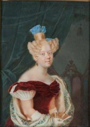 Елена Карловна Хрептович, ур. Нессельроде (1813 —1875)